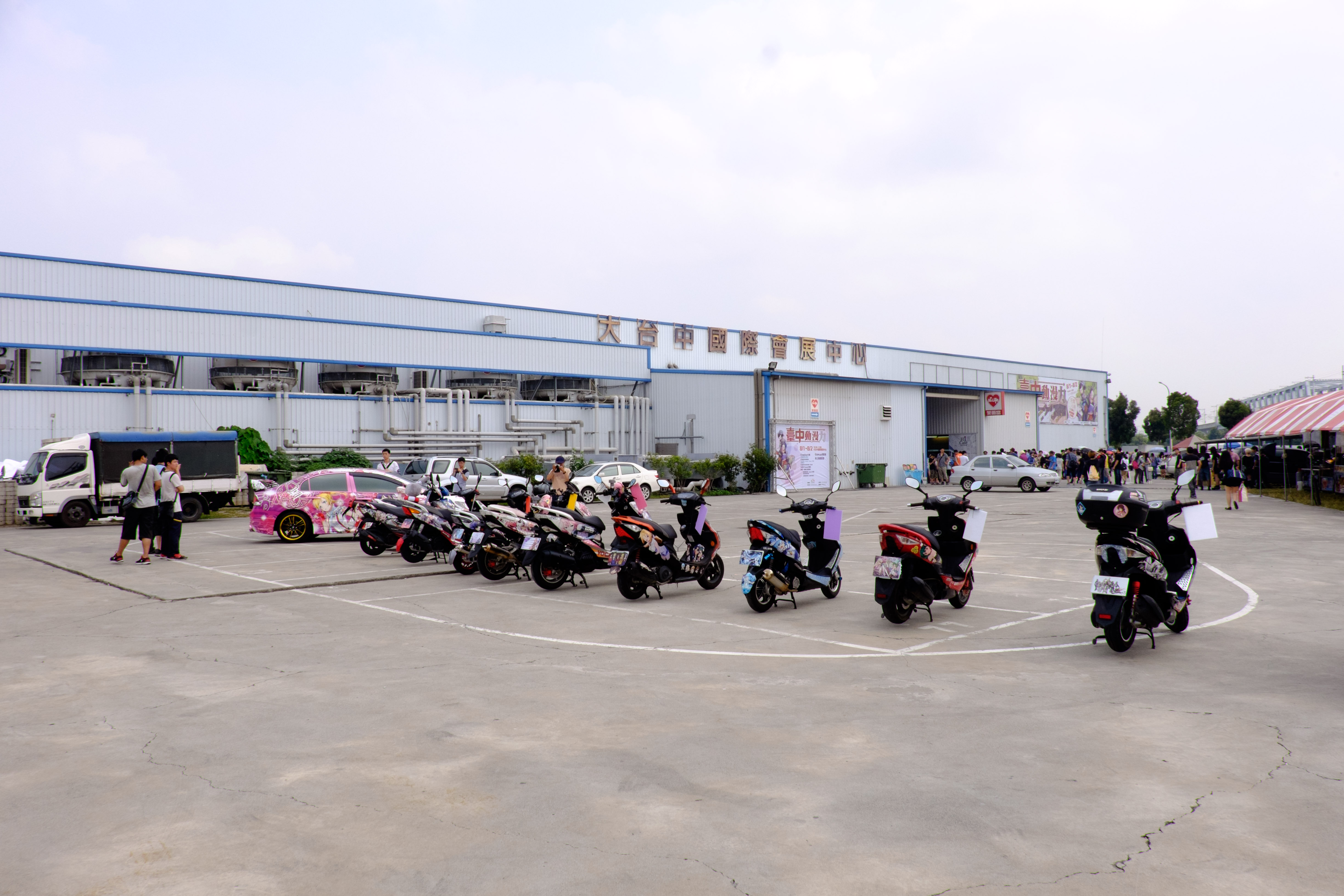 2015臺中動．漫．力開幕日，大臺中國際會展中心遠景，前方是展出的痛車、痛機車。